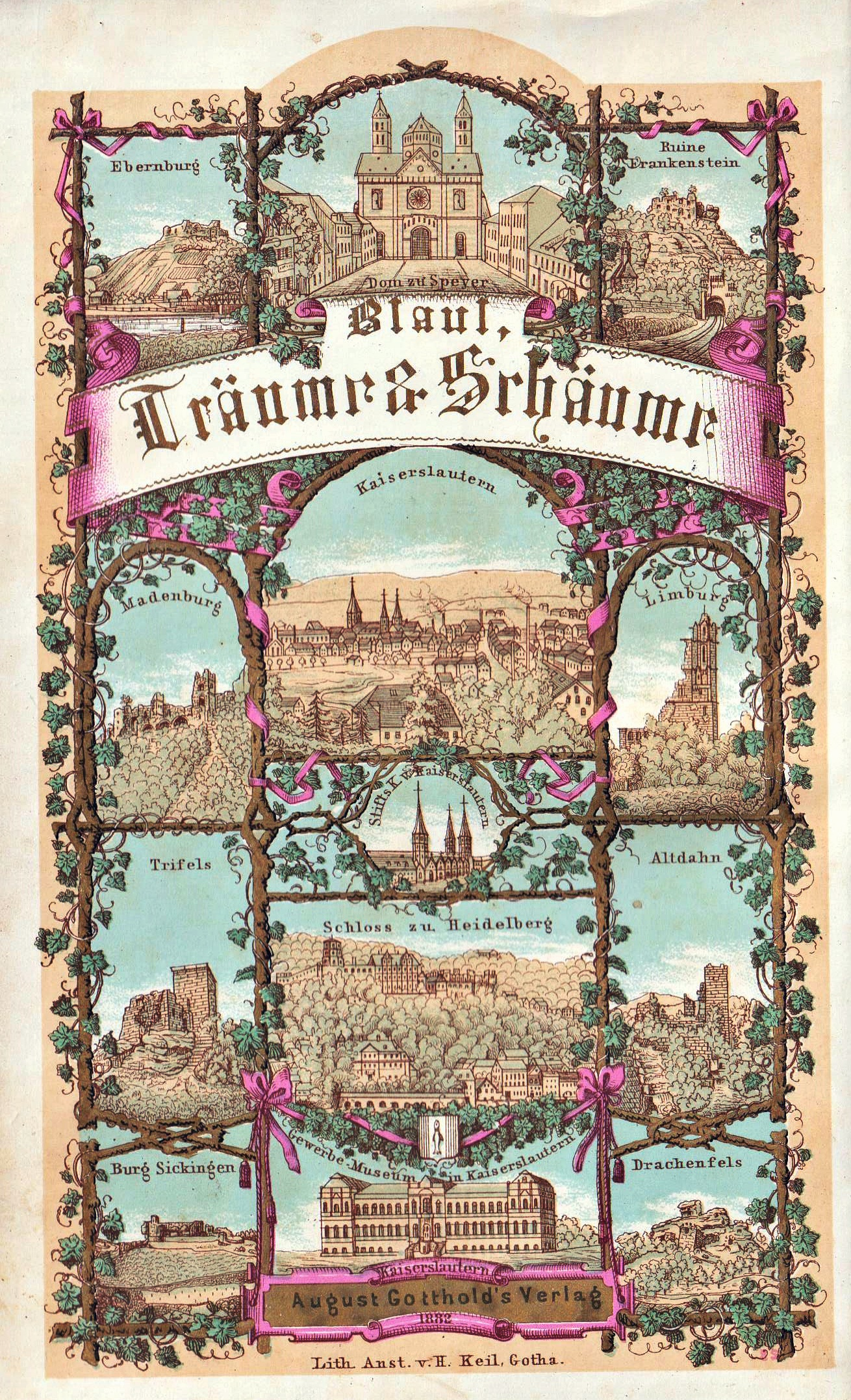 Titelblatt "Träume und Schäume vom Rhein (Reisebilder aus der Rheinpfalz)" von Georg Friedrich Blaul (1809-1863). Eigener Scan von eigenem altem Buch (1882).